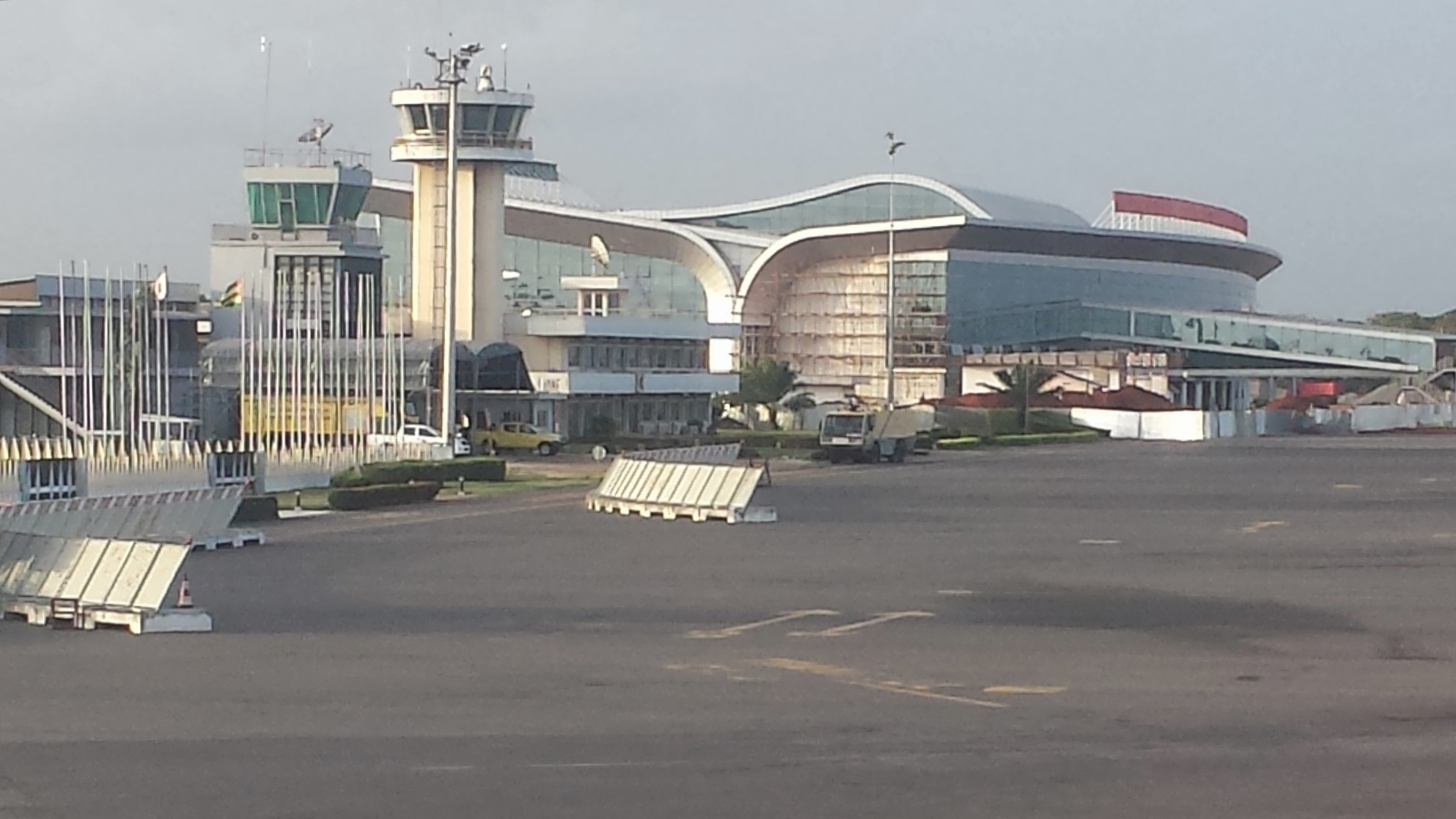 Togo, Lomé airport